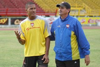 Salomón Rondón en un entrenamiento con el Aragua FC. A su derecha el Prof. Wilmer Ceballos.